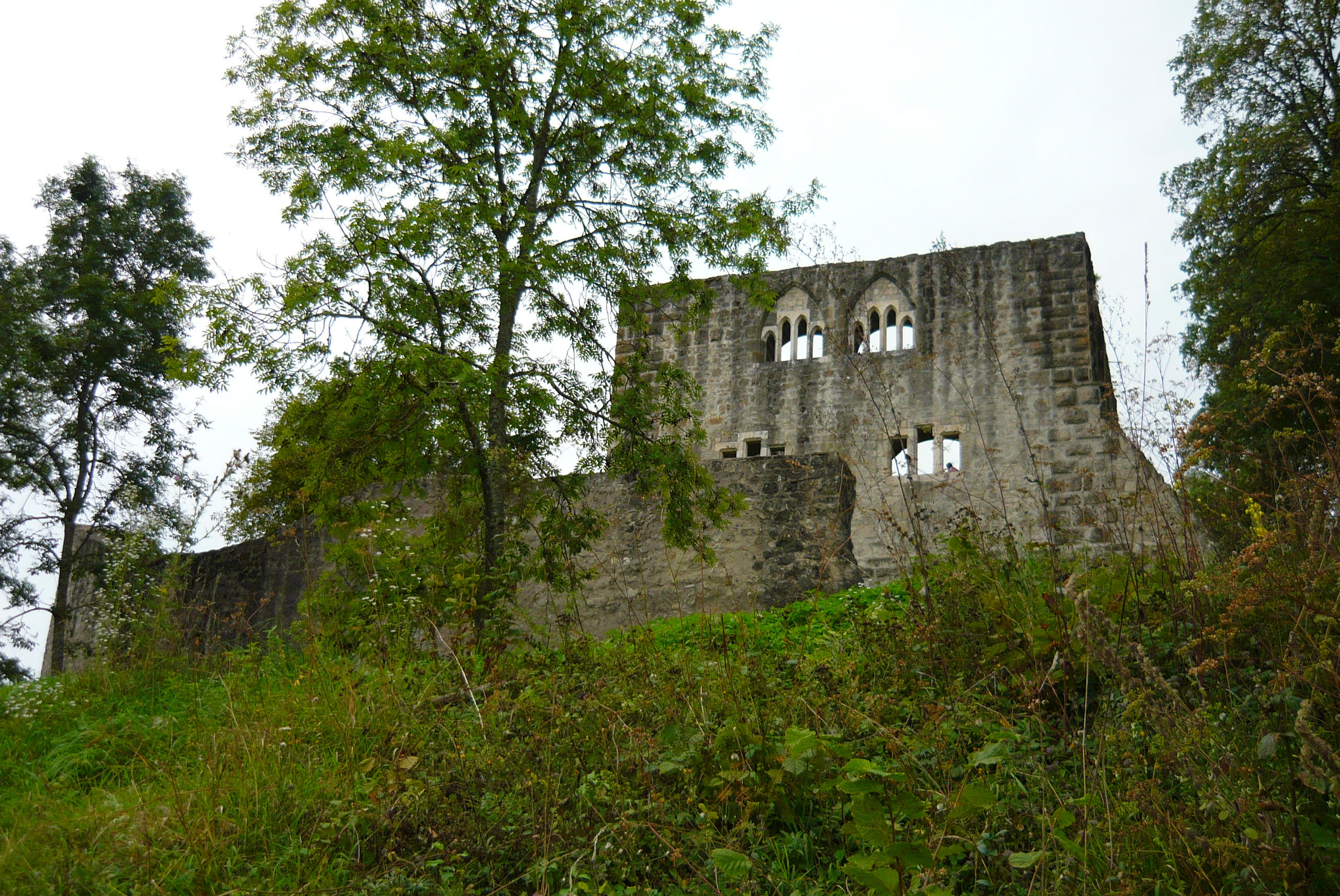 Burgruine Albeck, Ruins of Albeck Castle